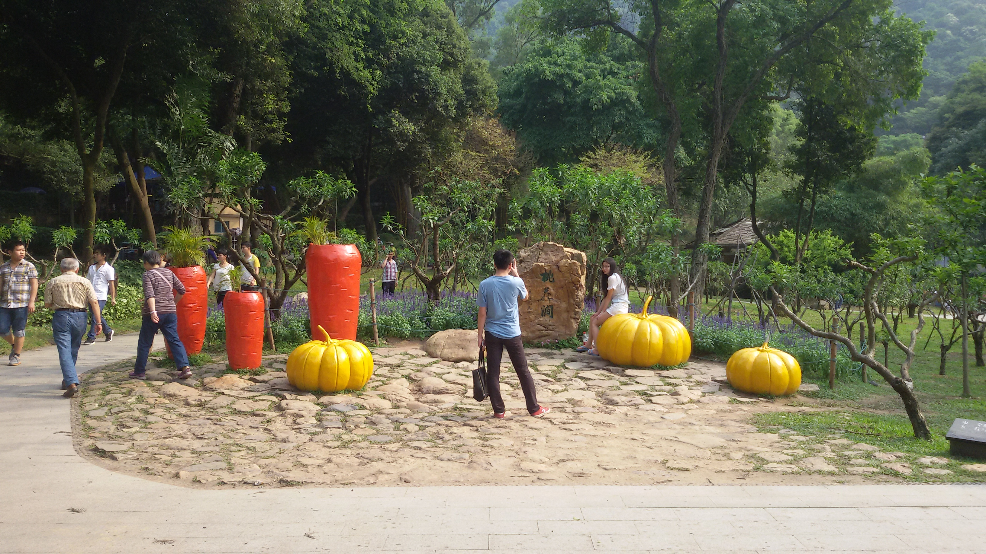 粵語: 广州白云山嘅桃花澗